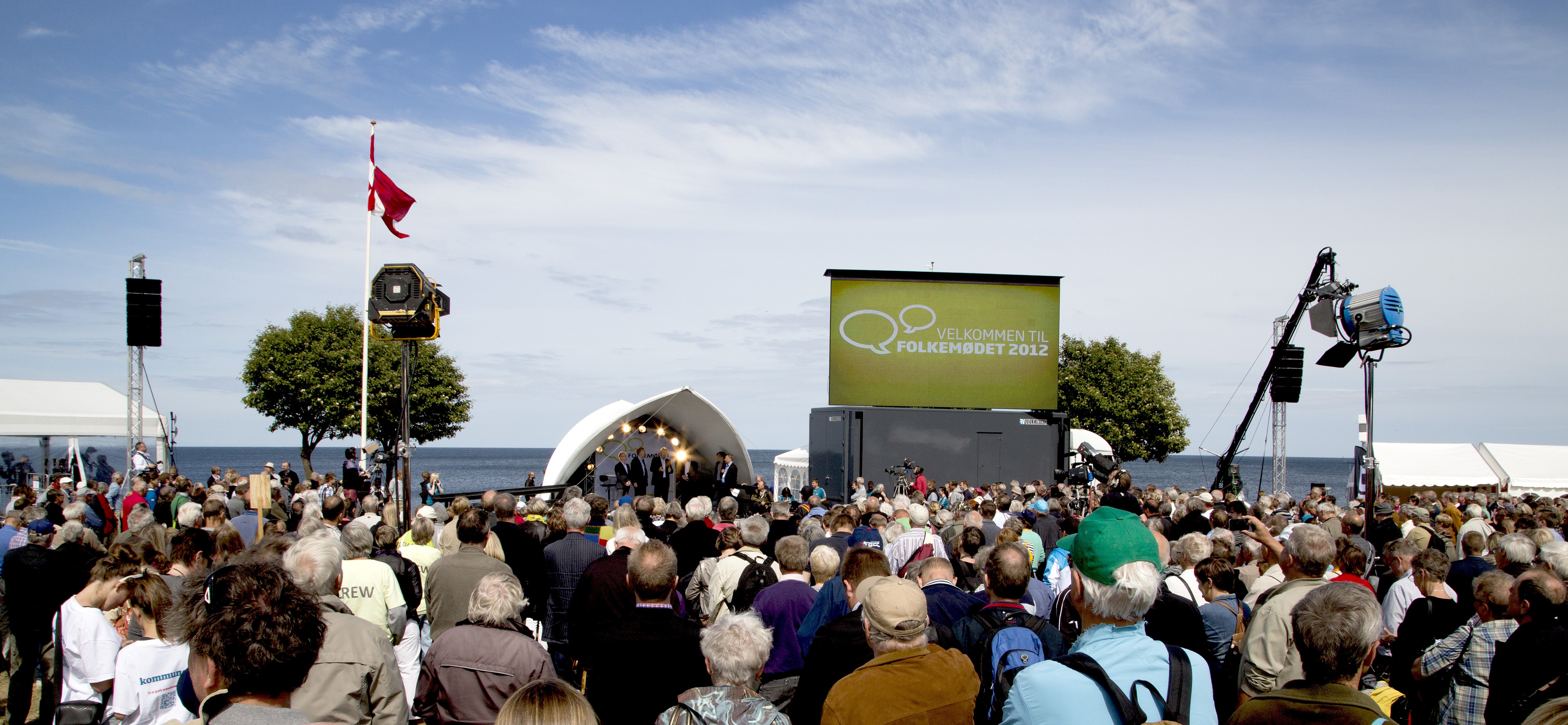 Folkemødet, Allinge, Bornholm, invigningen 2012-06-14.